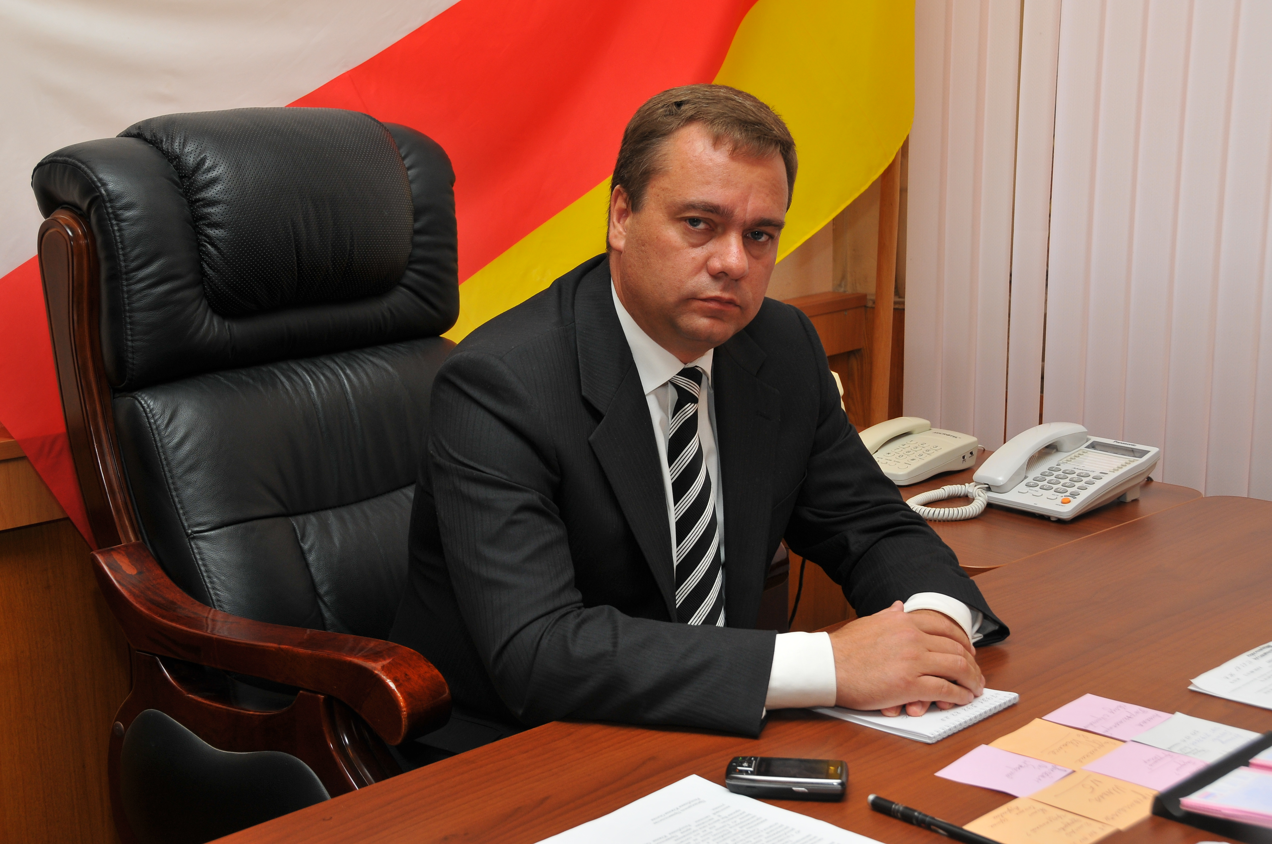 Вадим Бровцев, Председатель Правительства Республики Южная Осетия.